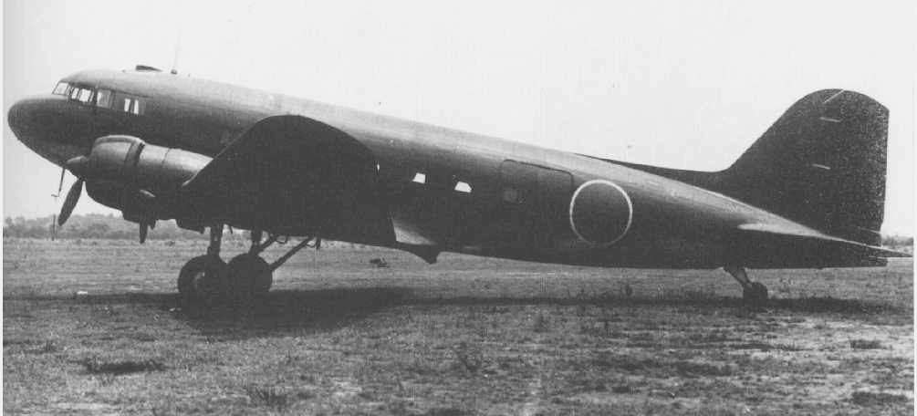 Фотография японского военно-транспортного самолёта